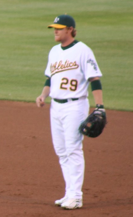 Dan Johnson